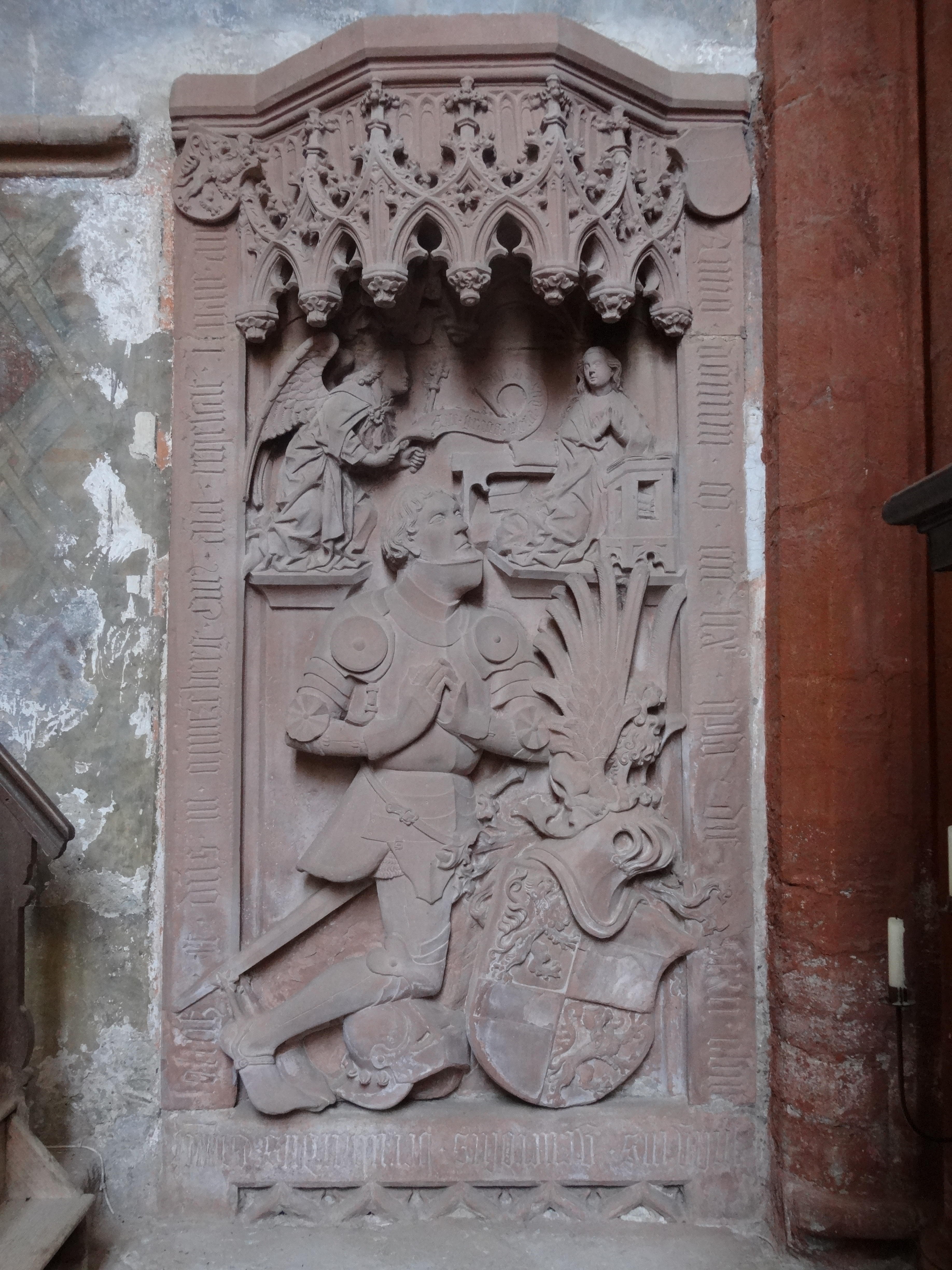 Kloster Altenberg (Solms)